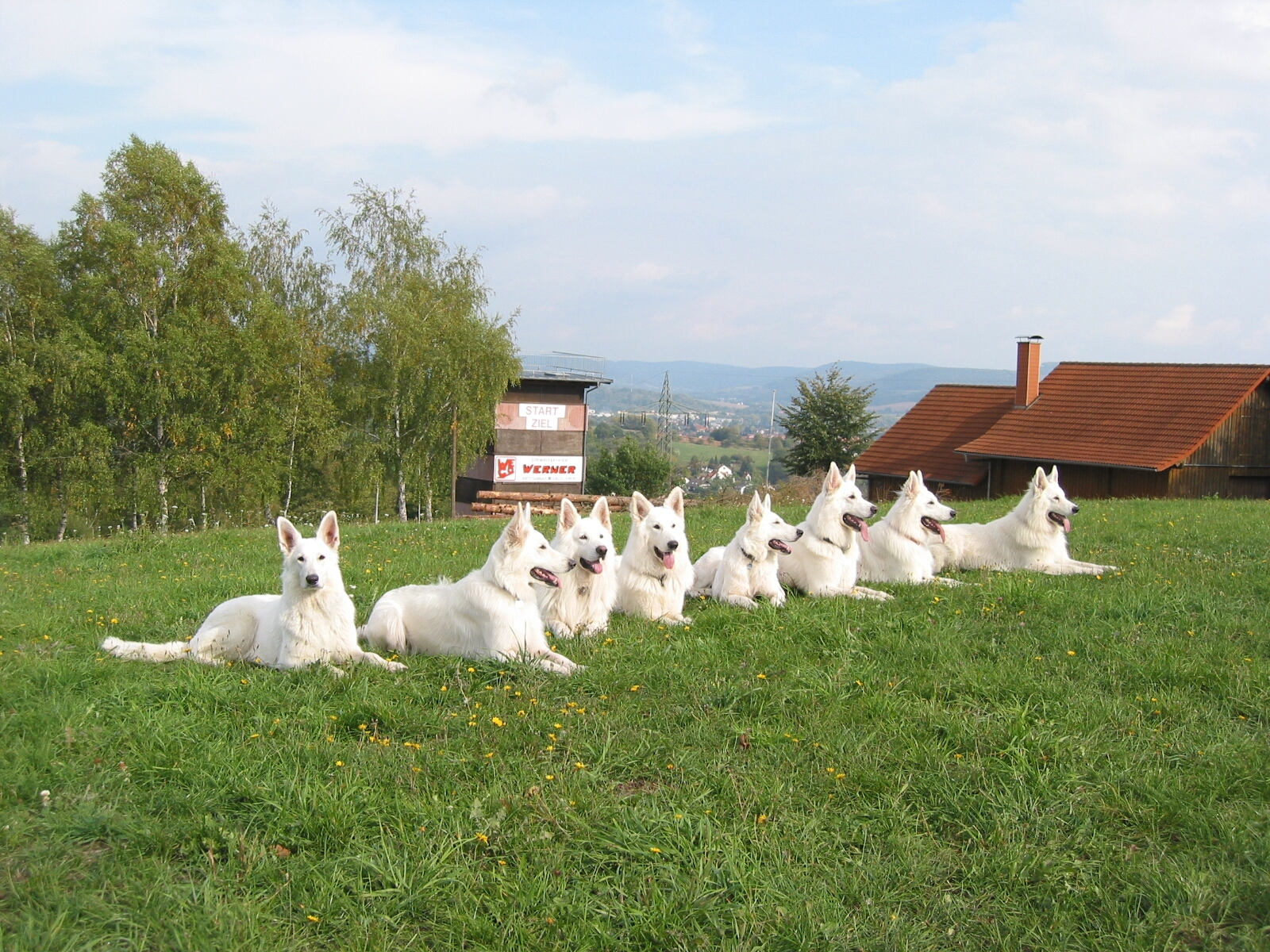 Weisse Schweizer Schaeferhunde